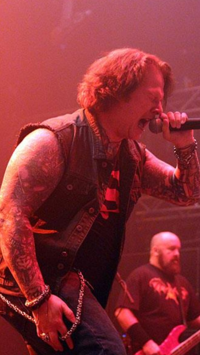 Dark Angel 2014